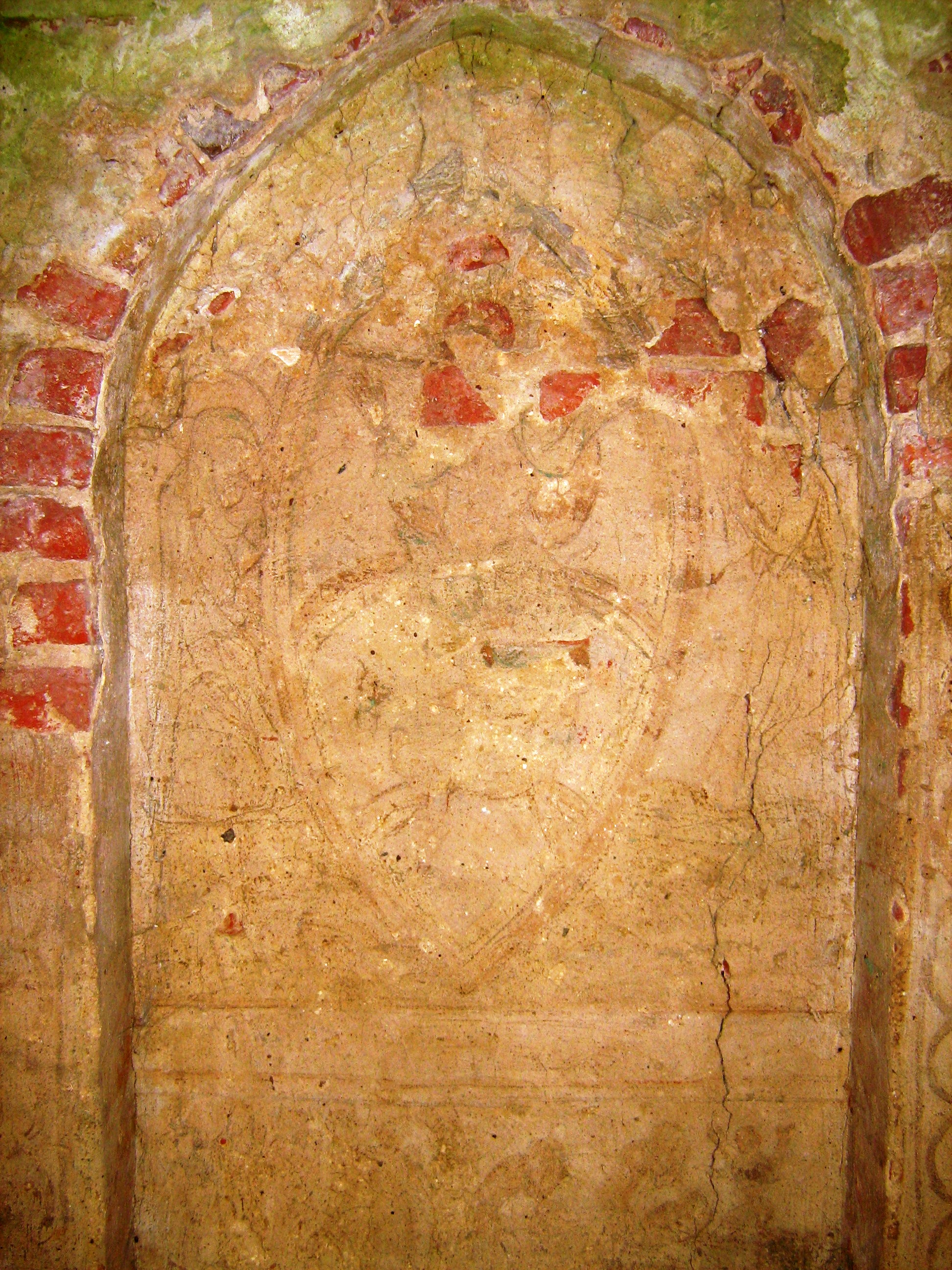 Kaplica cmentarna w Bystrzu. Wnętrze. Szczątkowy widok na jedyną już zachowaną polichromię zdobiącą ściany - CHRYSTUS ADOROWANY PRZEZ MATKĘ BOSKĄ I ŚWIĘTEGO JANA APOSTOŁA (ściana wschodnia). Ossarium z cenną gotycką polichromią to jedyny tego rodzaju zabytek na ziemiach polskich.